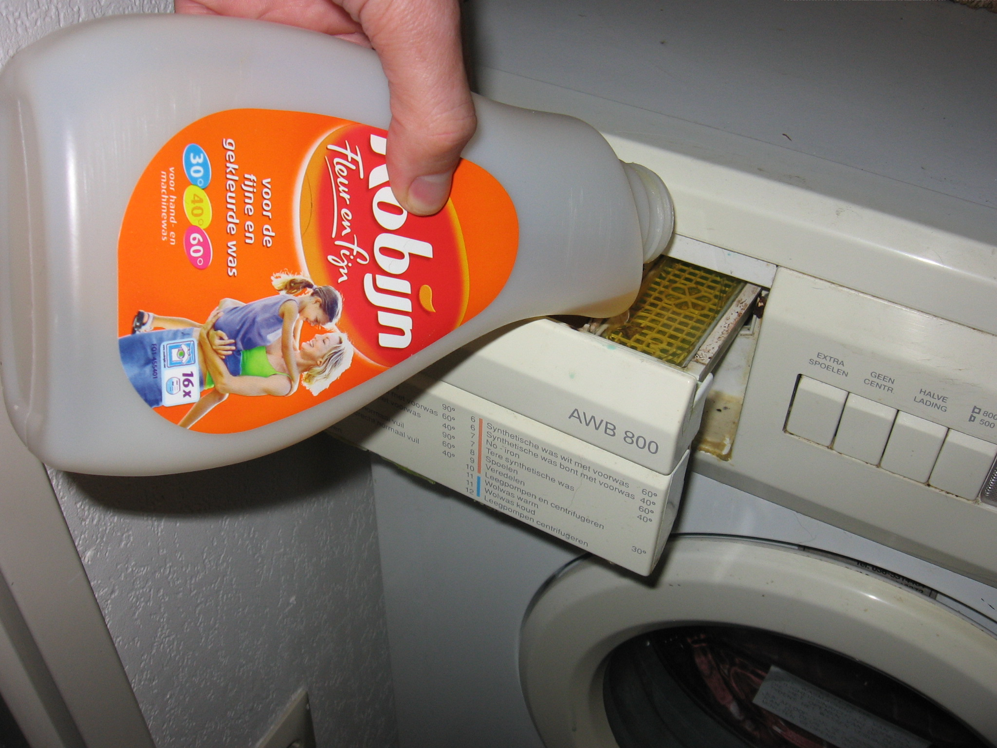 wasmiddel